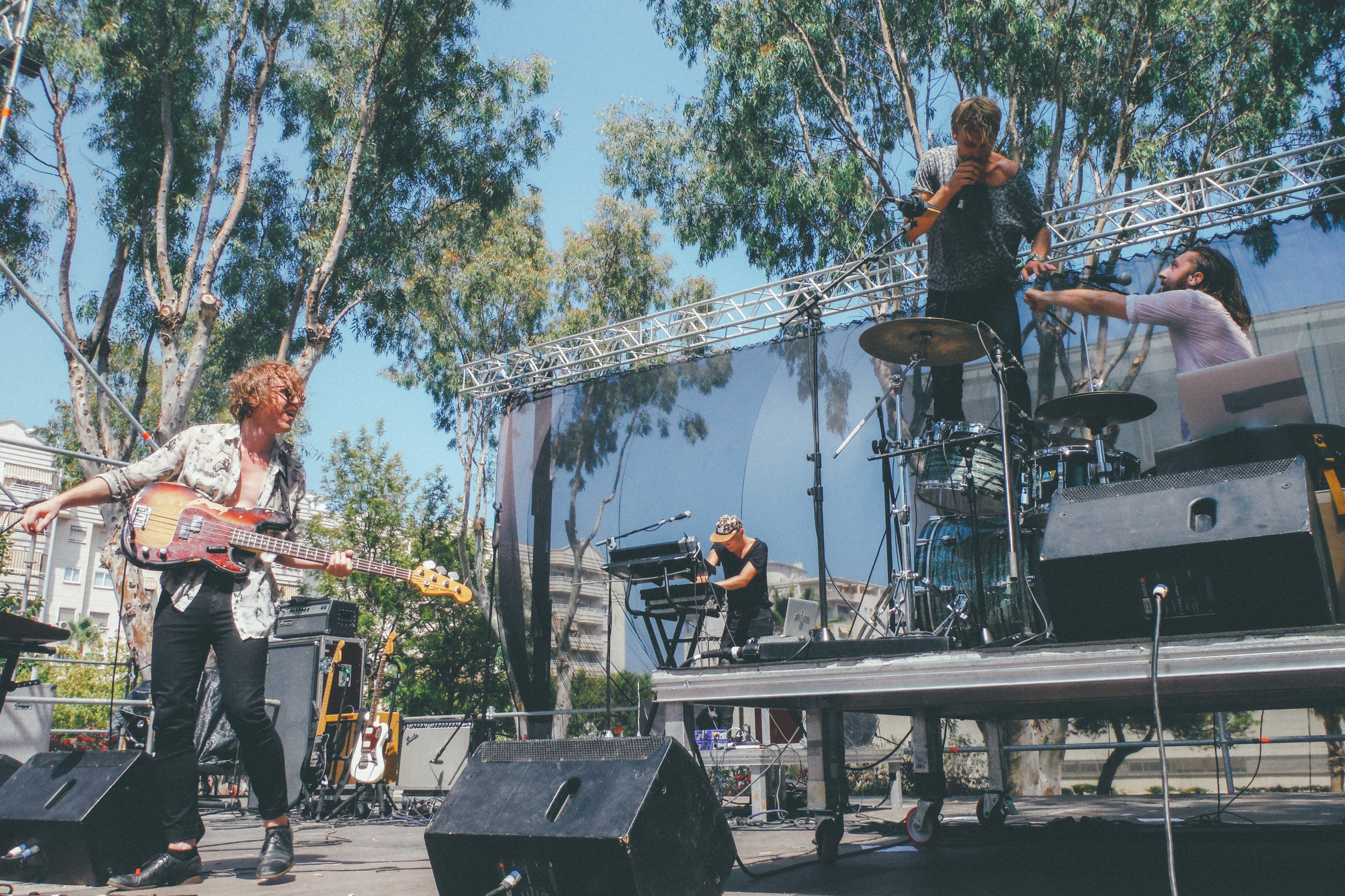 Concierto de The Royal Concept en el 101 Sun Festival 2014, Málaga, España.